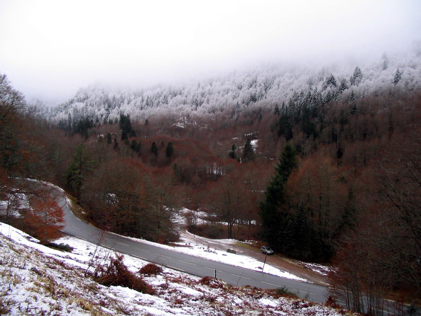 Première neige sur le col du Somport (Pyrénées Atlantiques) Pyrénées).